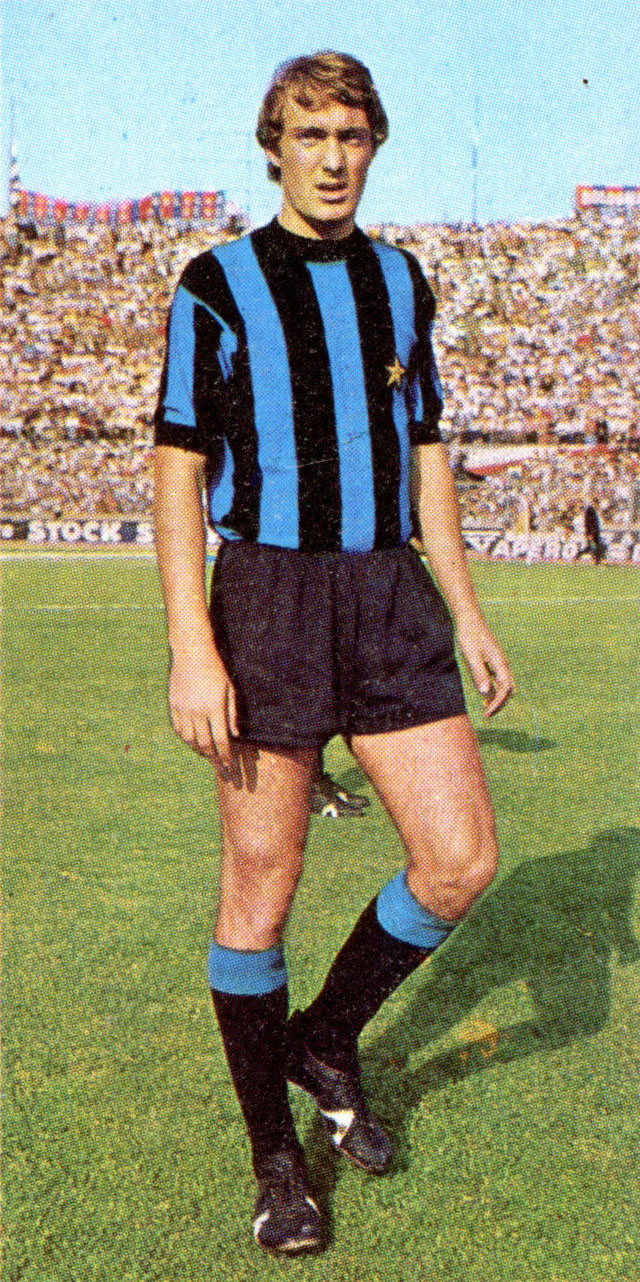 Bologna, stadio Comunale, 11 ottobre 1970. Il centrocampista dell'Inter, Bernardino Fabbian, in occasione della trasferta sul campo del Bologna (2-2) valevole per la 3ª giornata del campionato italiano di Serie A 1970-71.